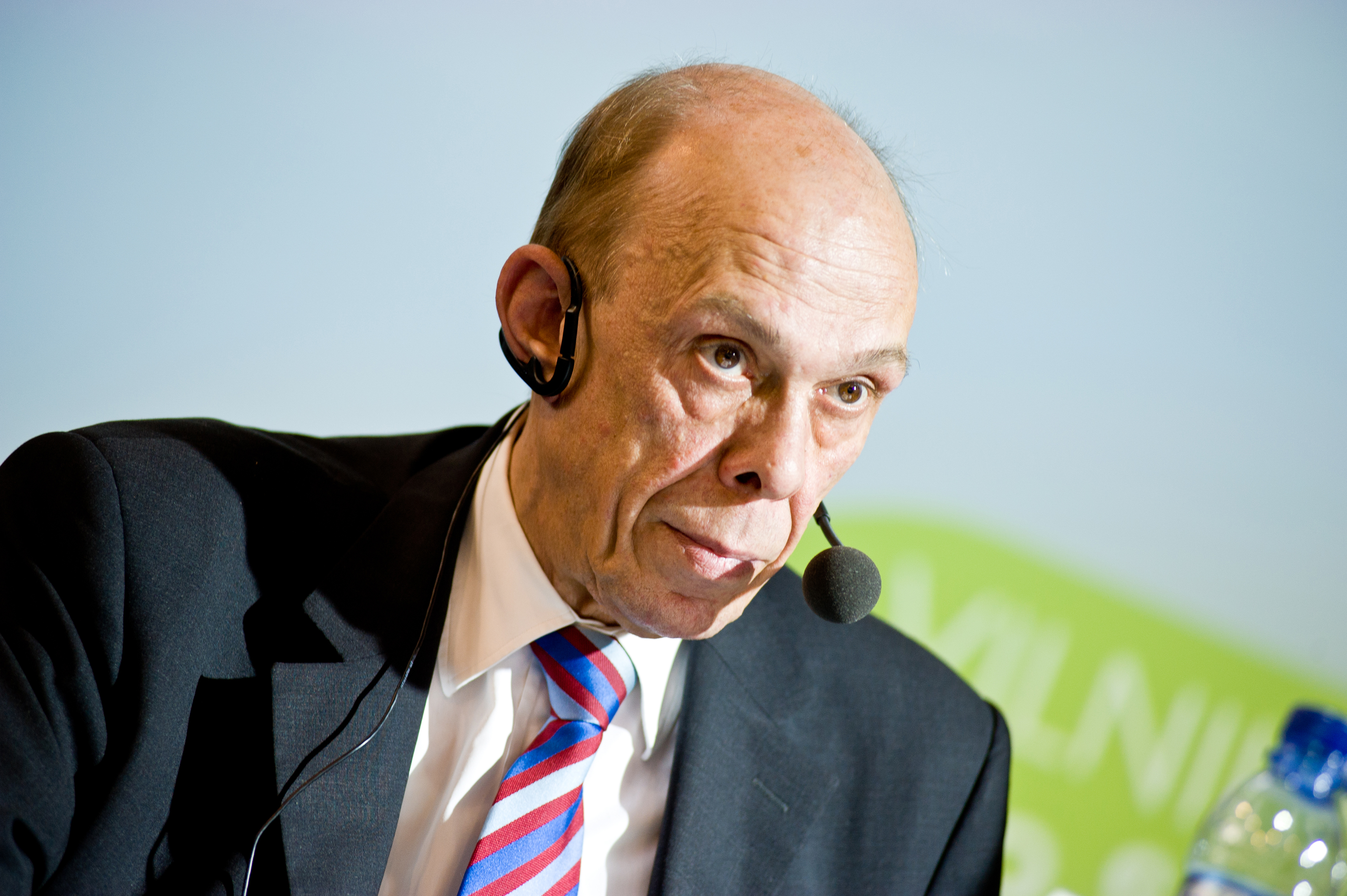 © Evgenia Levin